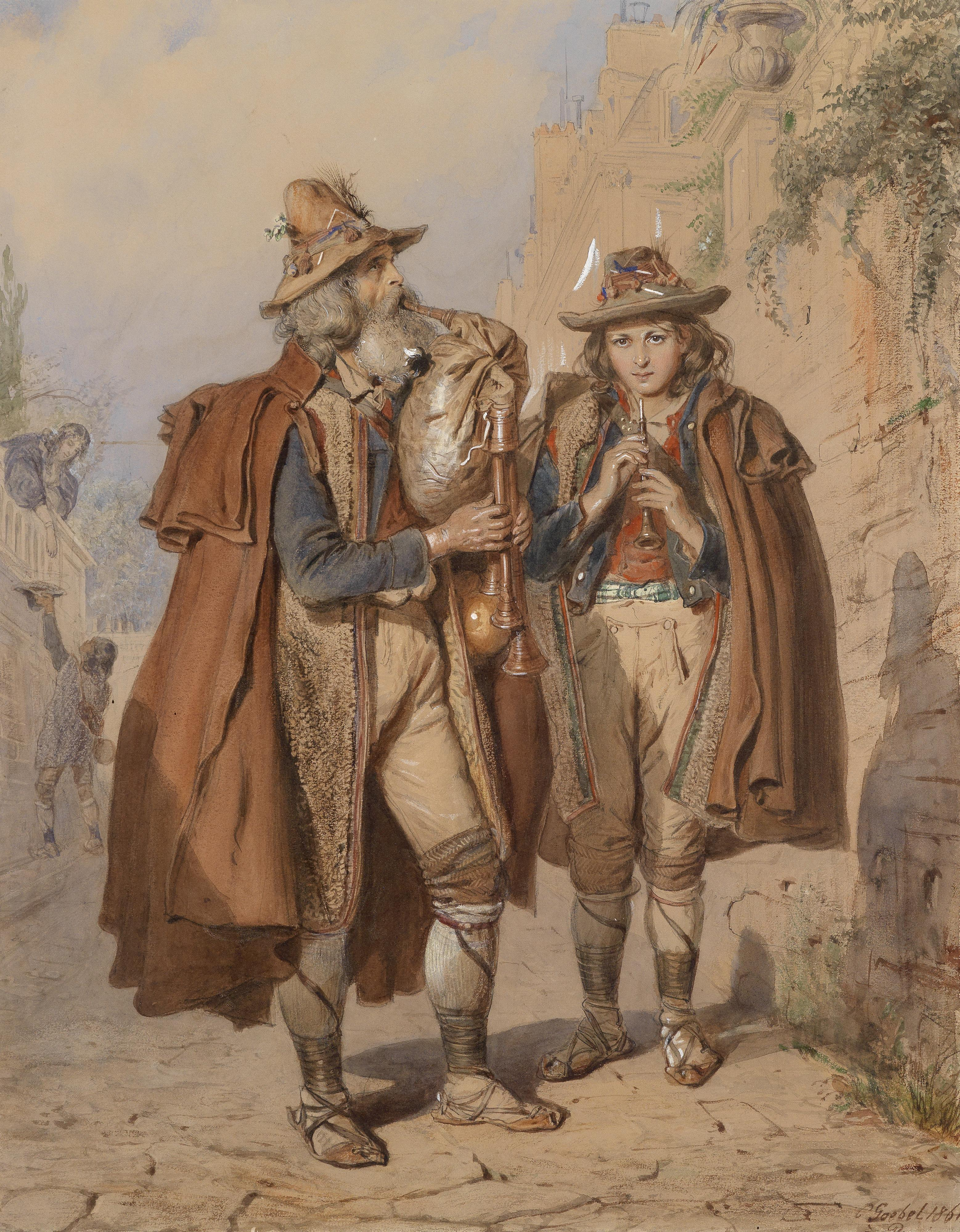 Dudelsackpfeifer und Flötenspieler, signiert und datiert C. Goebel 1864 Paris, Aquarell und Deckweiß auf Papier, 57 x 44,5 cm